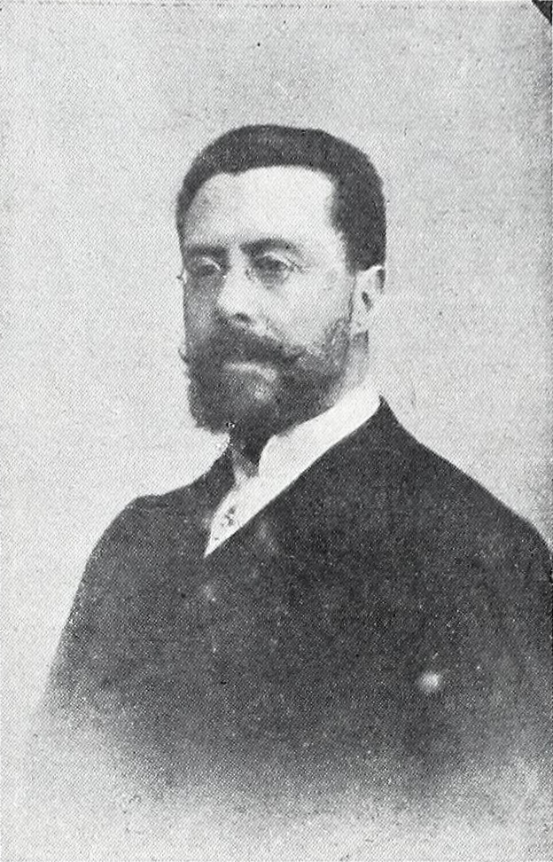 Benigno Quiroga Ballesteros